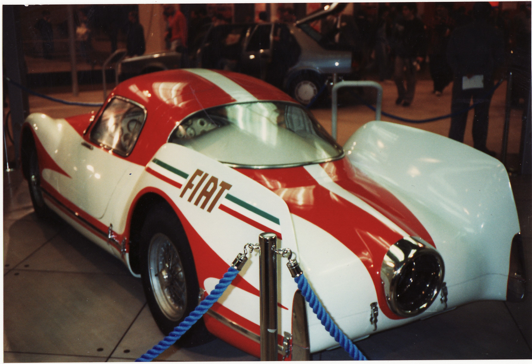 Stunning Gas Turbine Car